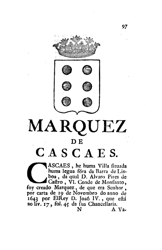 Página 97 das Memorias Historicas e Genealogicas dos Grandes de Portugal ― Marquez de Cascaes